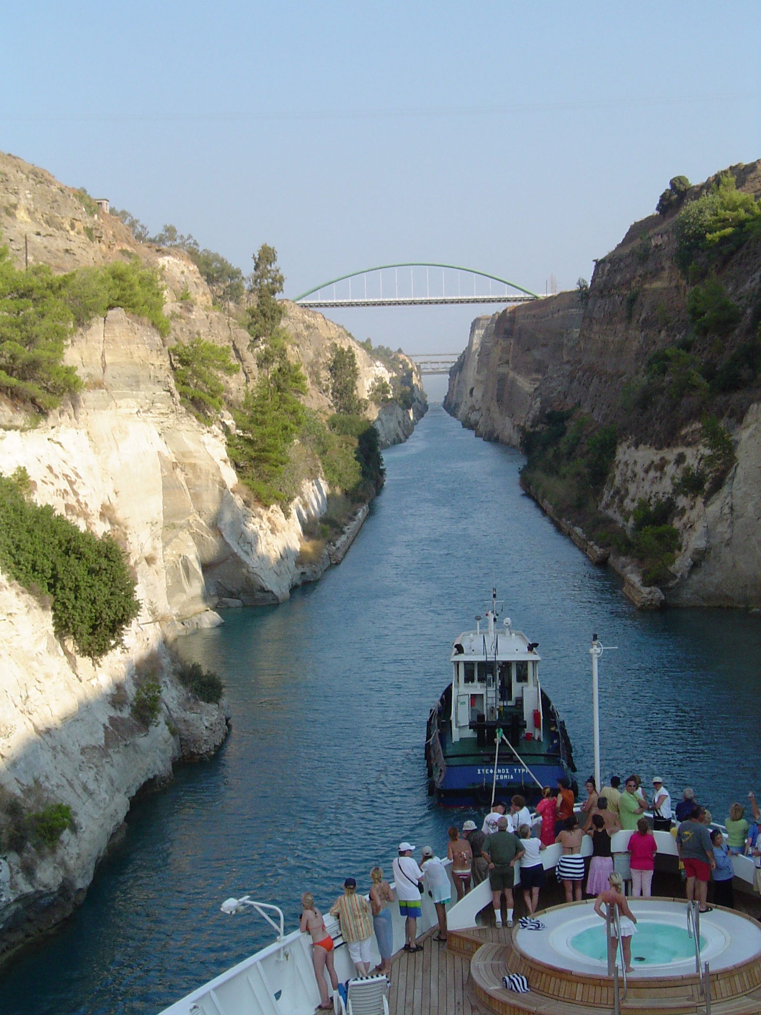 Sujet: Afaart vum Kanal vu Corinth (vu_Corinth aus gesinn).